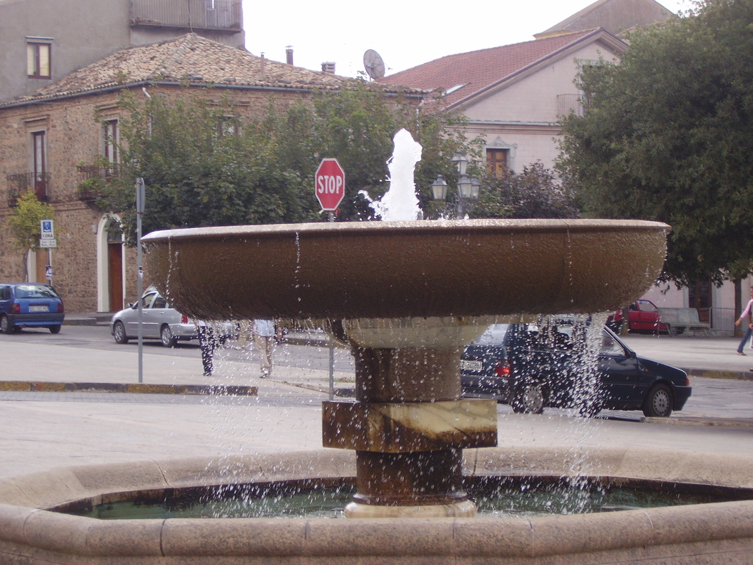 Fontana nel comune di Filadelfia.